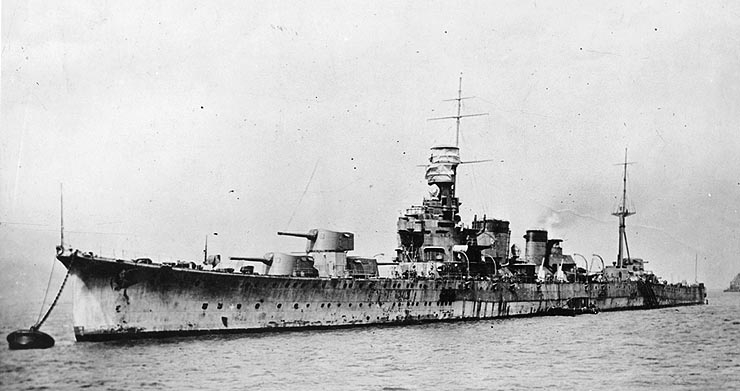 L'incrociatore dell'Impero giapponese Kako nell'aprile 1926 prima del completamento.